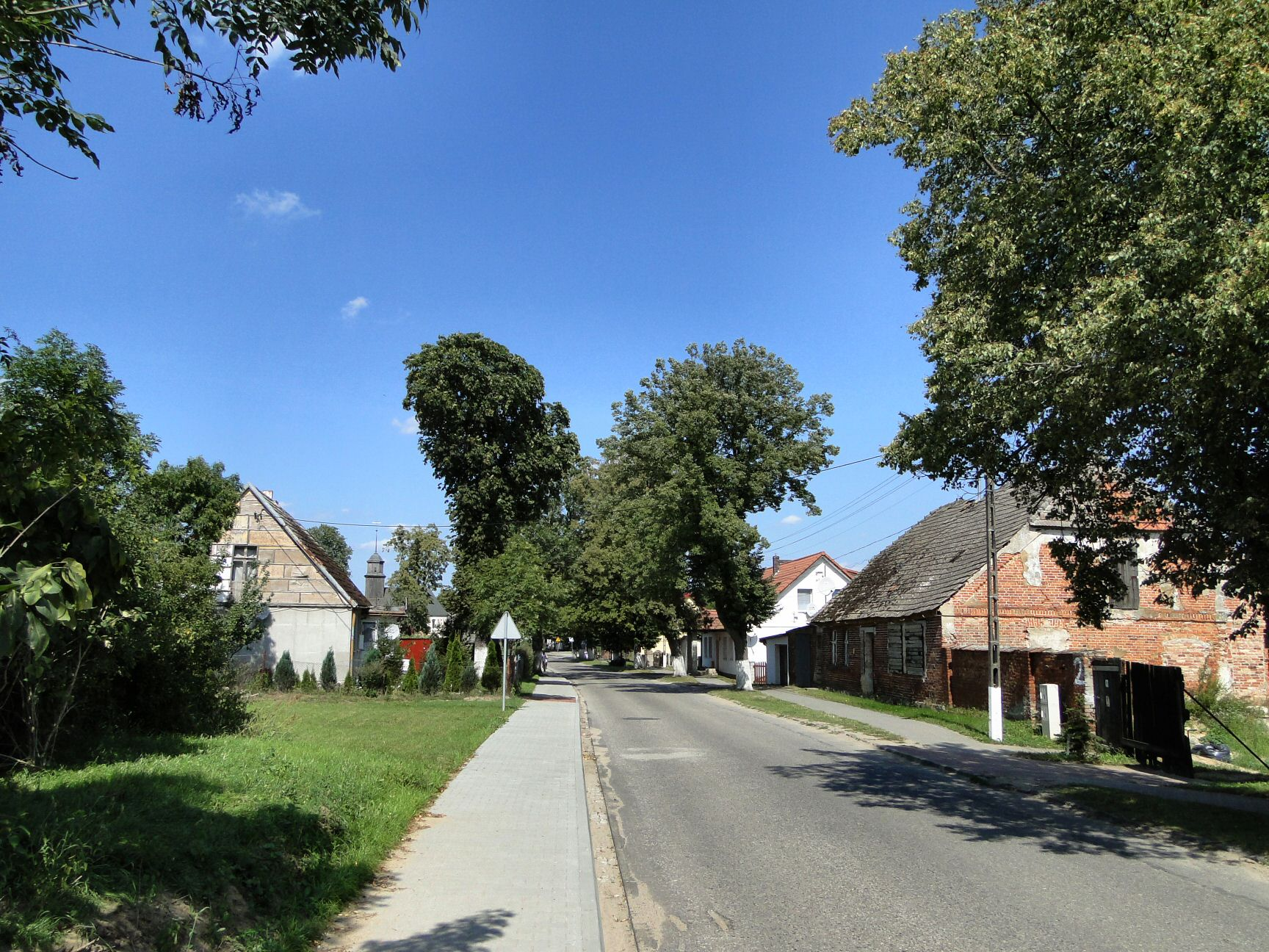 Wąwelnica